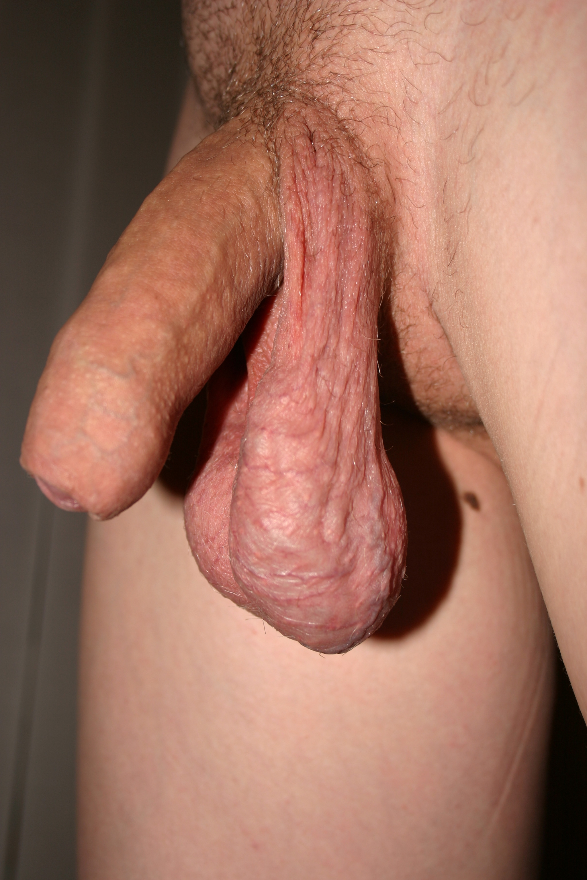 sehr gut zu erkennende Varikozele